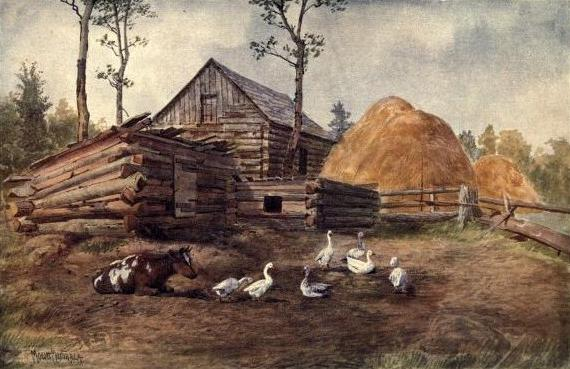 A settlers farm yard